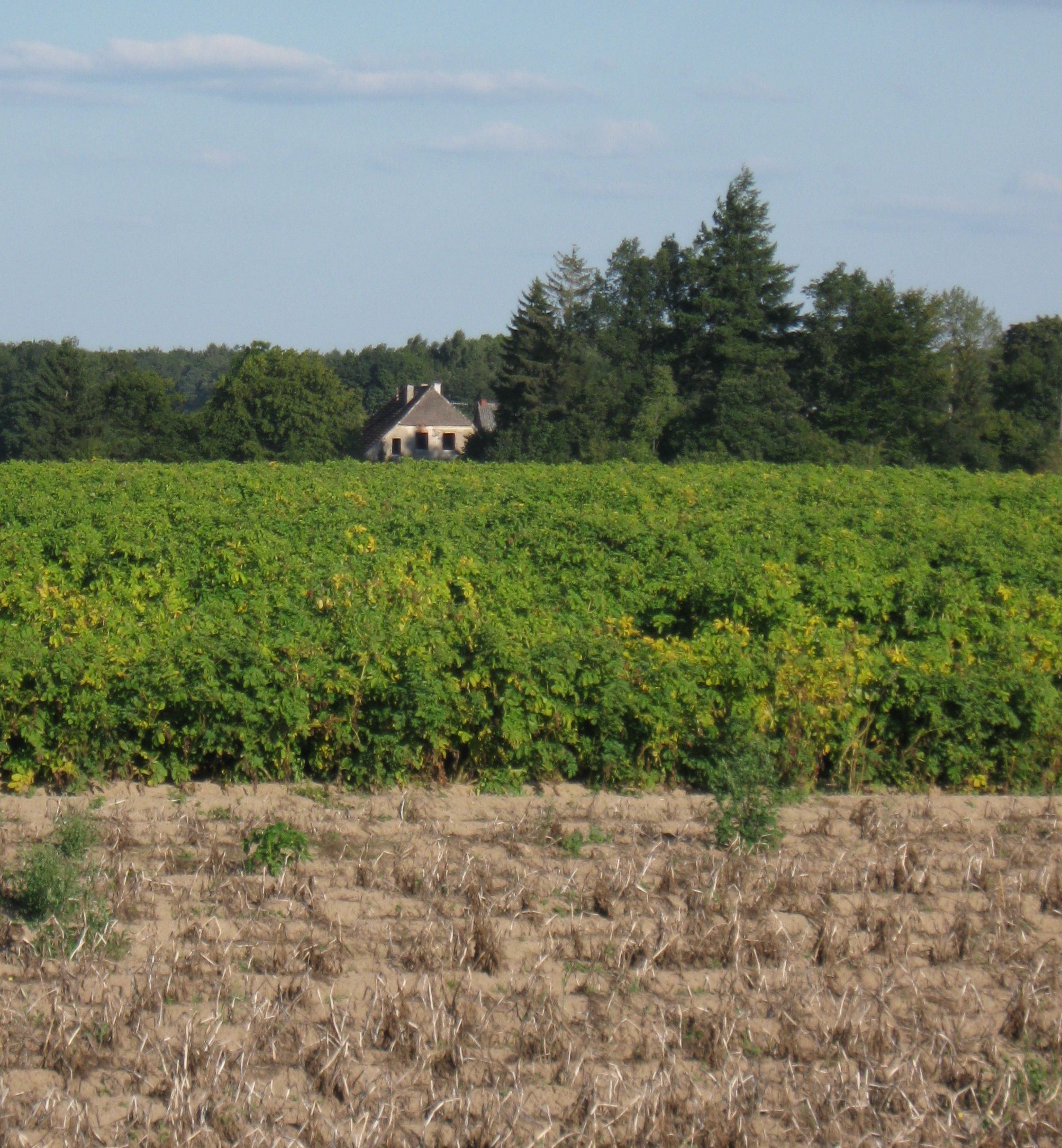 Widok na Rębice z drogi powiatowej Rościęcino - Rzesznikowo w pobliżu skrzyżowania na Starnin